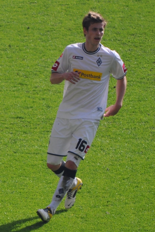 Nordtveit im Spiel gegen Köln